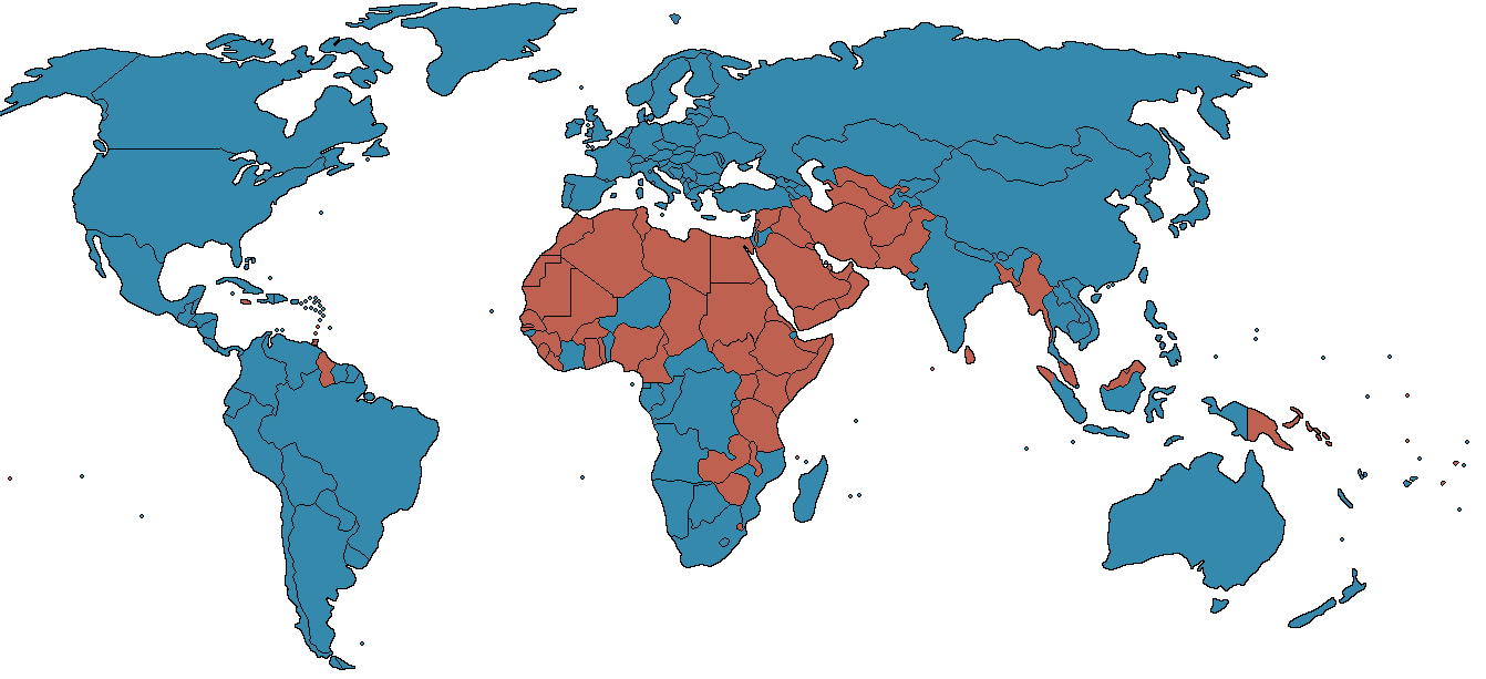 Países que han despenalizado la homosexualidad en azul. Países donde continúa siendo ilegal en rojo.